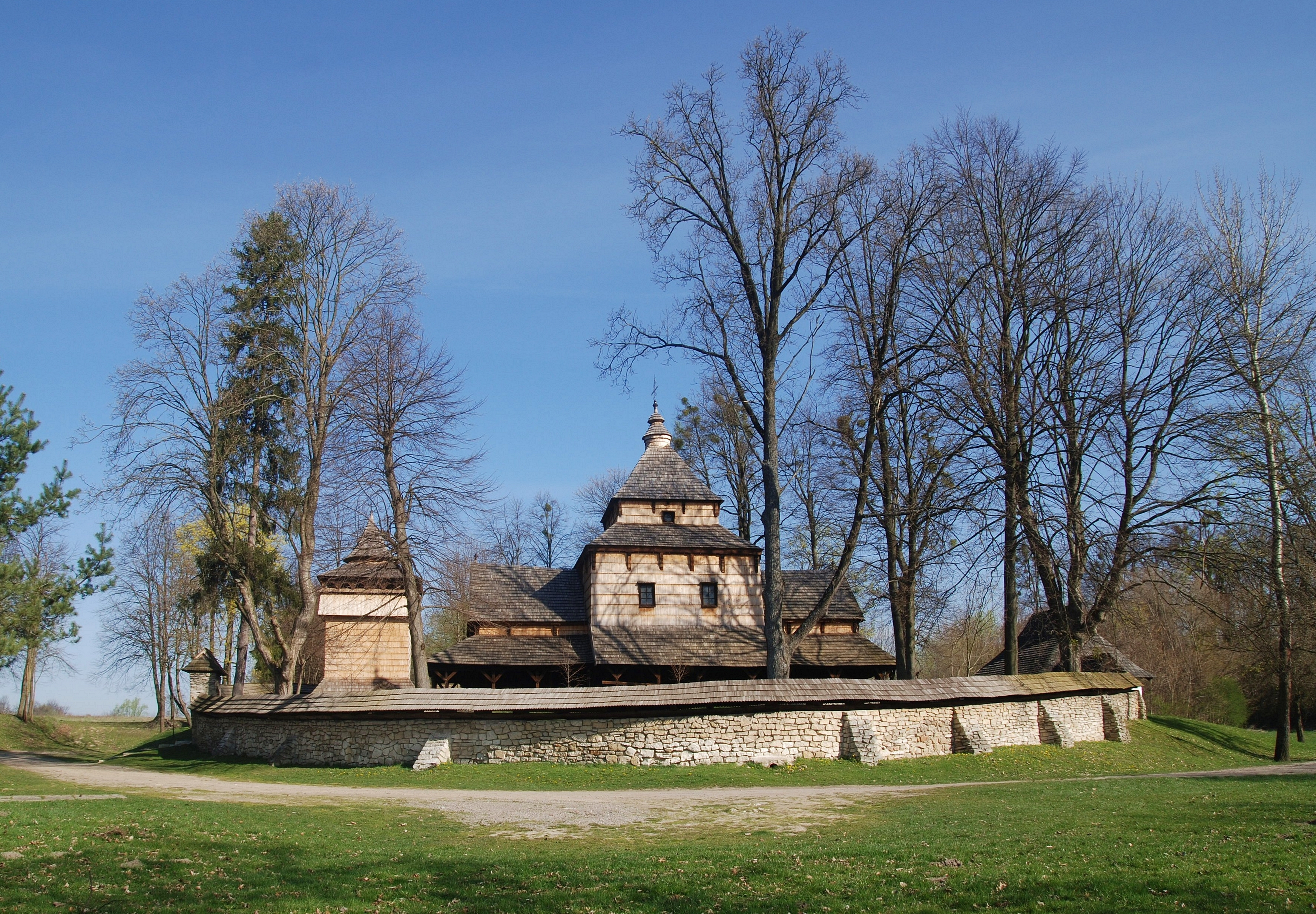 wieś Radruż